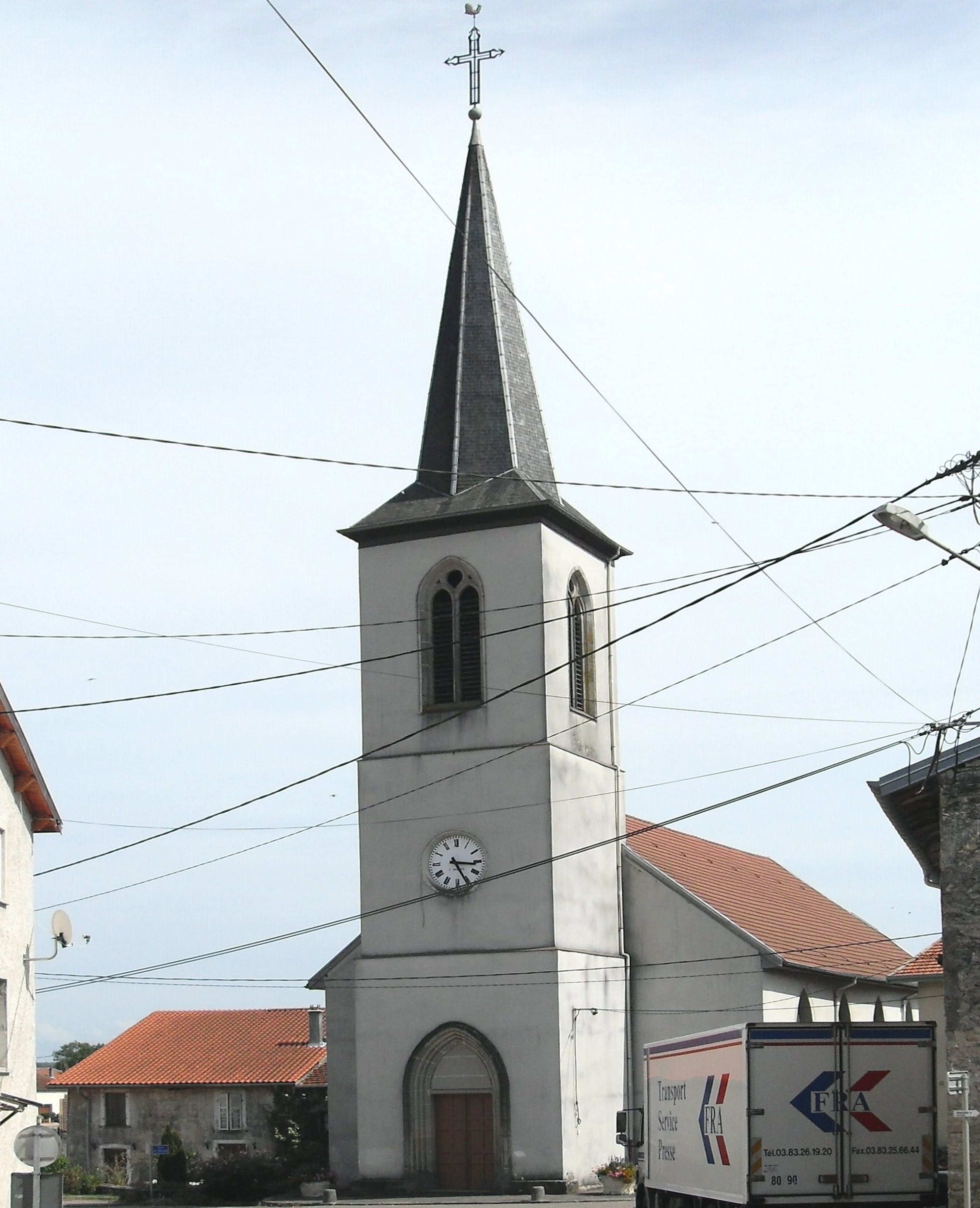 L'église Saint-Léonard à Socourt